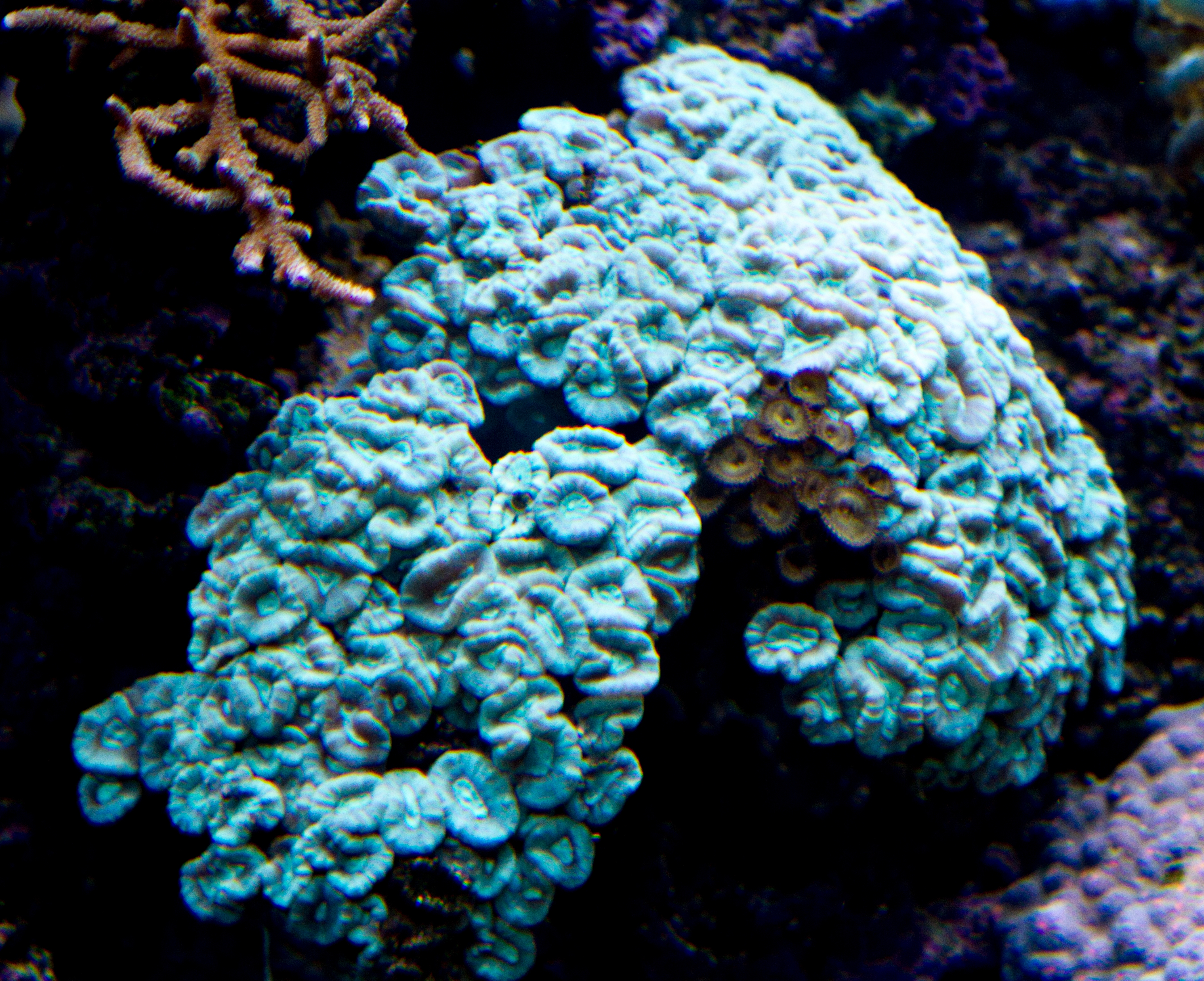 Colonia de Caulastraea sp. rodea una colonia de Zoanthus sp. Acuario S.E.A., Singapur, 2013